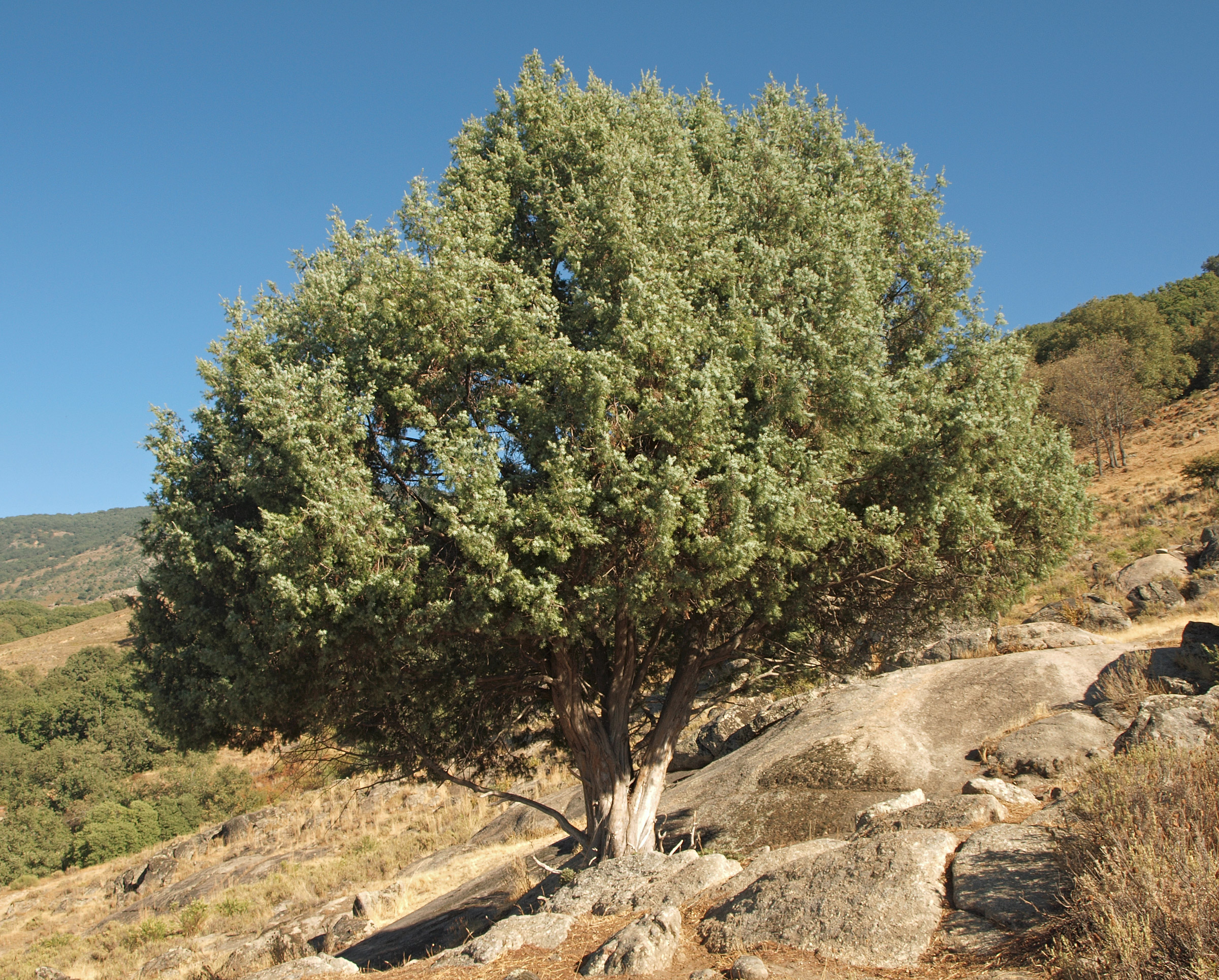 Enebro de la miera, Juniperus oxycedrus, Losar de la Vera (Cáceres, España).